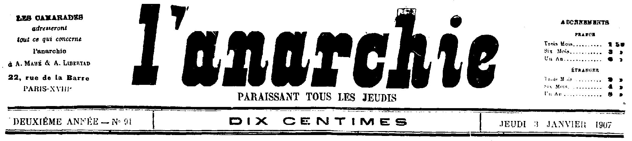 l'anarchie (1905-1914)